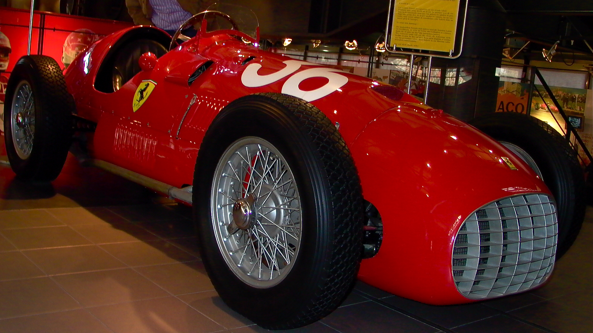 Ferrari Museum, Maranello, Italy